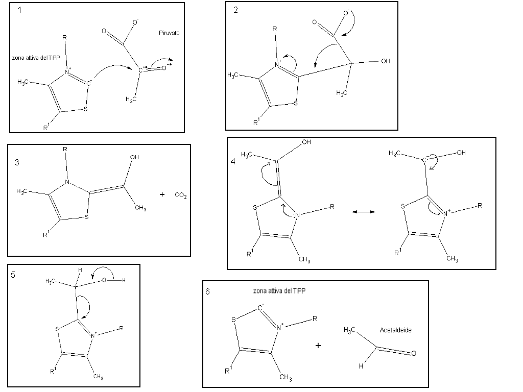 Meccanismo di reazione della tiamina pirofosfato disegnato con programma freeware per struture chimiche e l'ausilio di paint